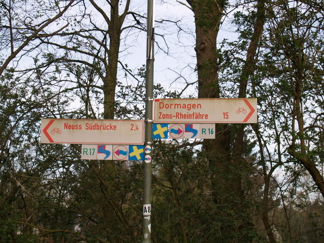 Radwegweiser Erft (R 16 und R 17 u.a. Routen)